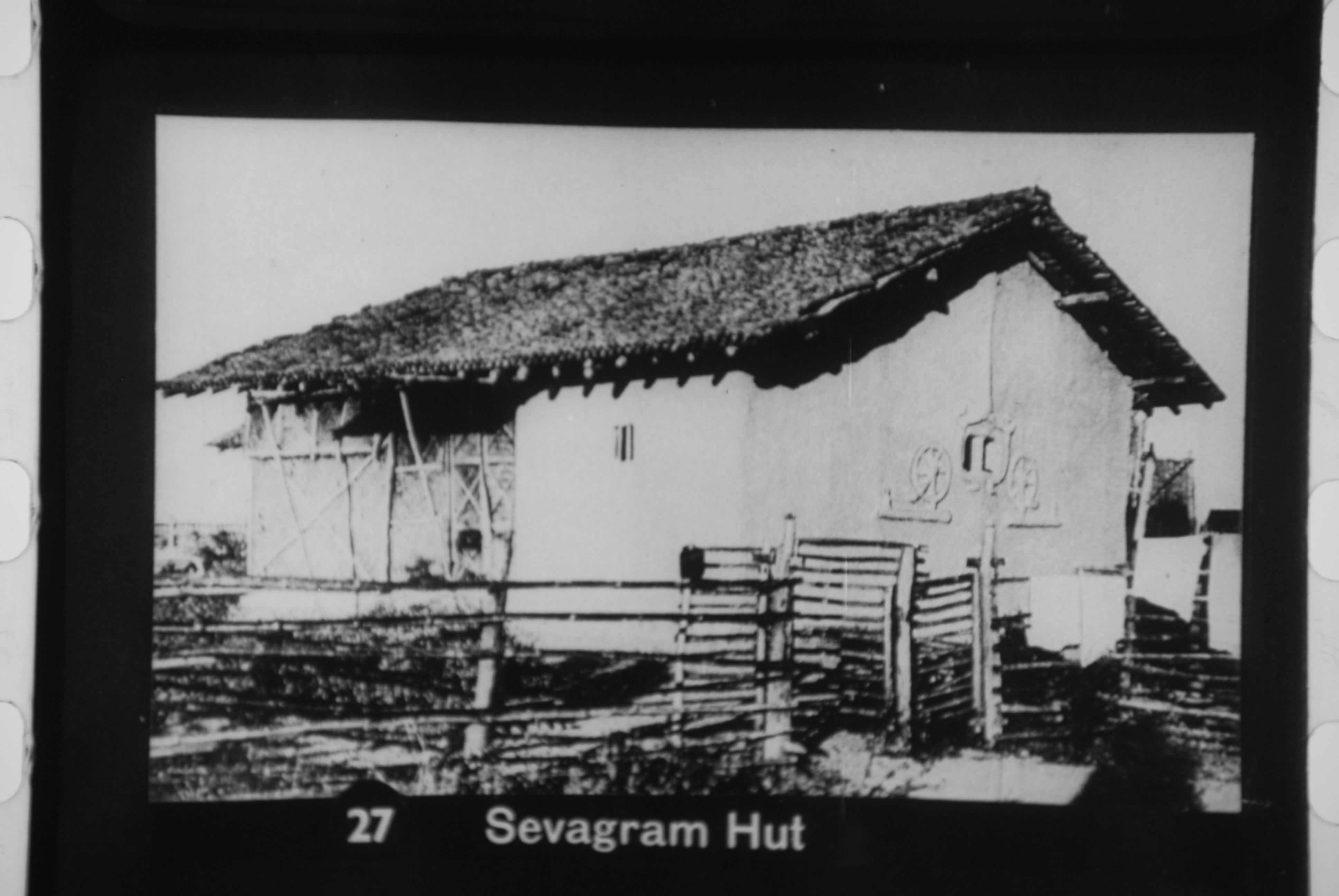 Gandhi's Sevagram Hut